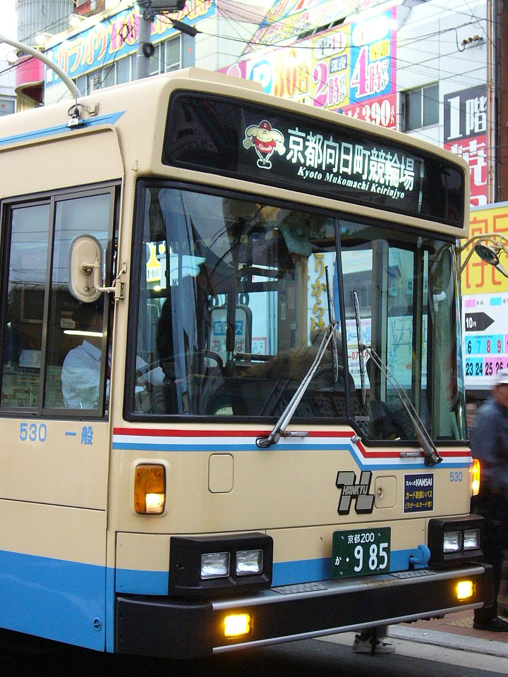 京都向日町競輪場への阪急バス臨時便 東向日駅前にて